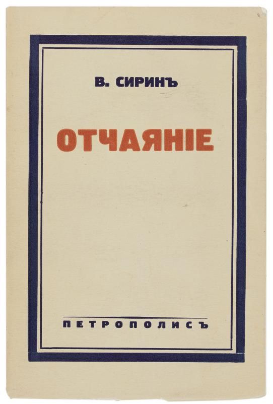 Обложка первого издания романа В. Набокова (Сирина) "Отчаяние"